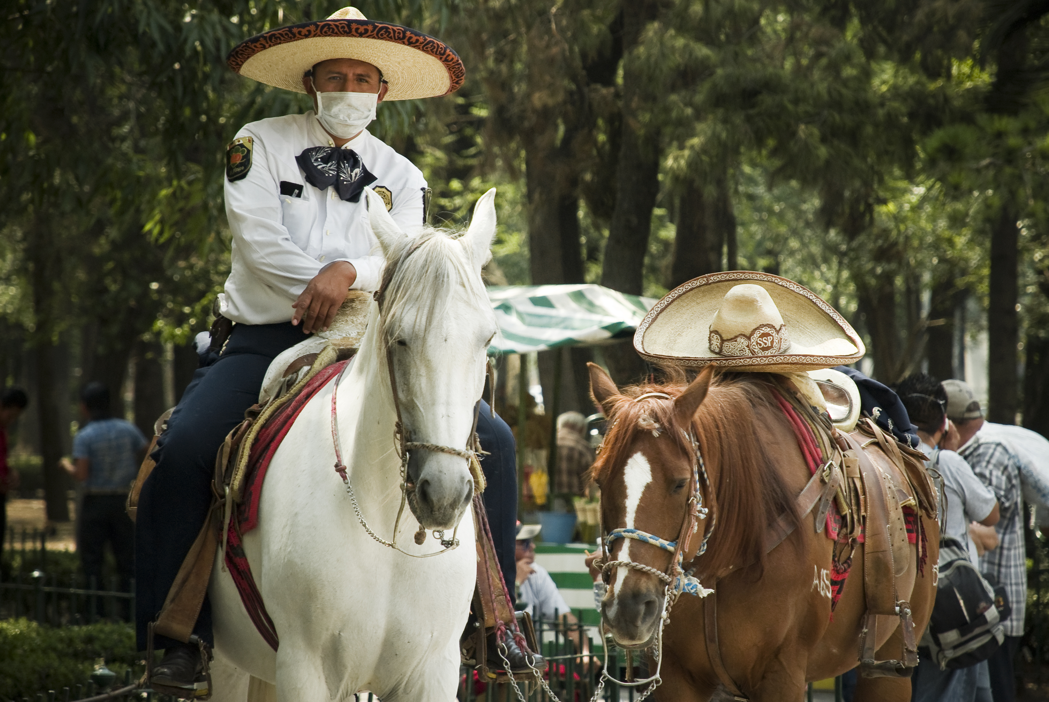 Oficial de la Policía Montada de la Alameda Central protegido con tapabocas para evitar contagiarse de ingluenza. Esta policia fue creada para cuidar la seguridad de los turistas. Visten con una suerte de mezcla entre traje de charro y uniforme policiaco. Por supuesto, está utilizando la mínima protección que requiere su oficio. Epidemia de Influenza 2009, Ciudad de México.